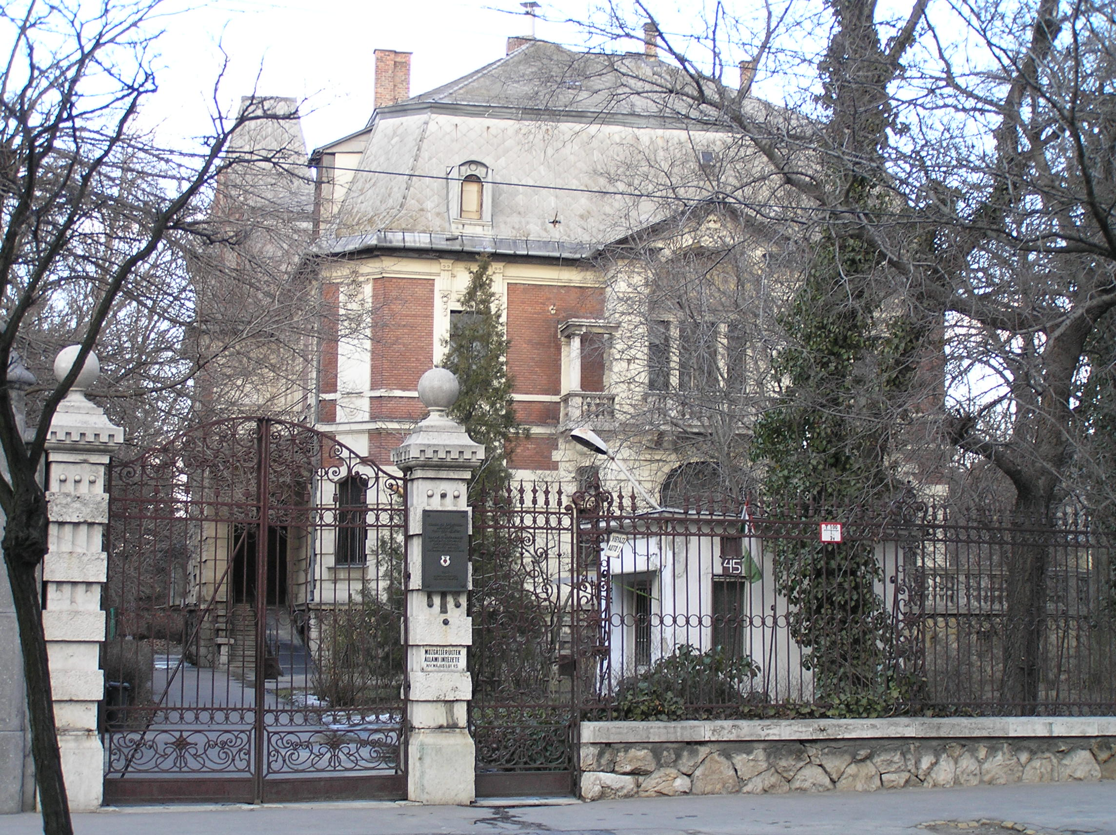 Roheim villa Budapesten, a XIV. kerületi Hermina út 45-ben. Itt gyilkolták meg Tisza István miniszterelnököt. This is a photo of a monument in Hungary. Identifier: 11581